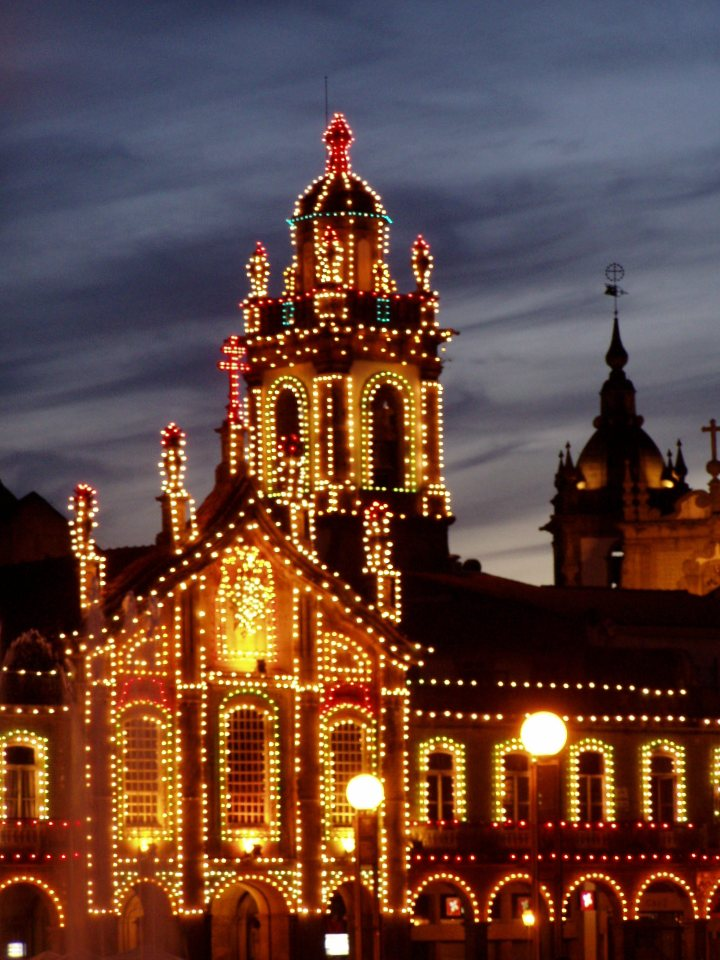 Arcada à noite. Braga, Portugal.